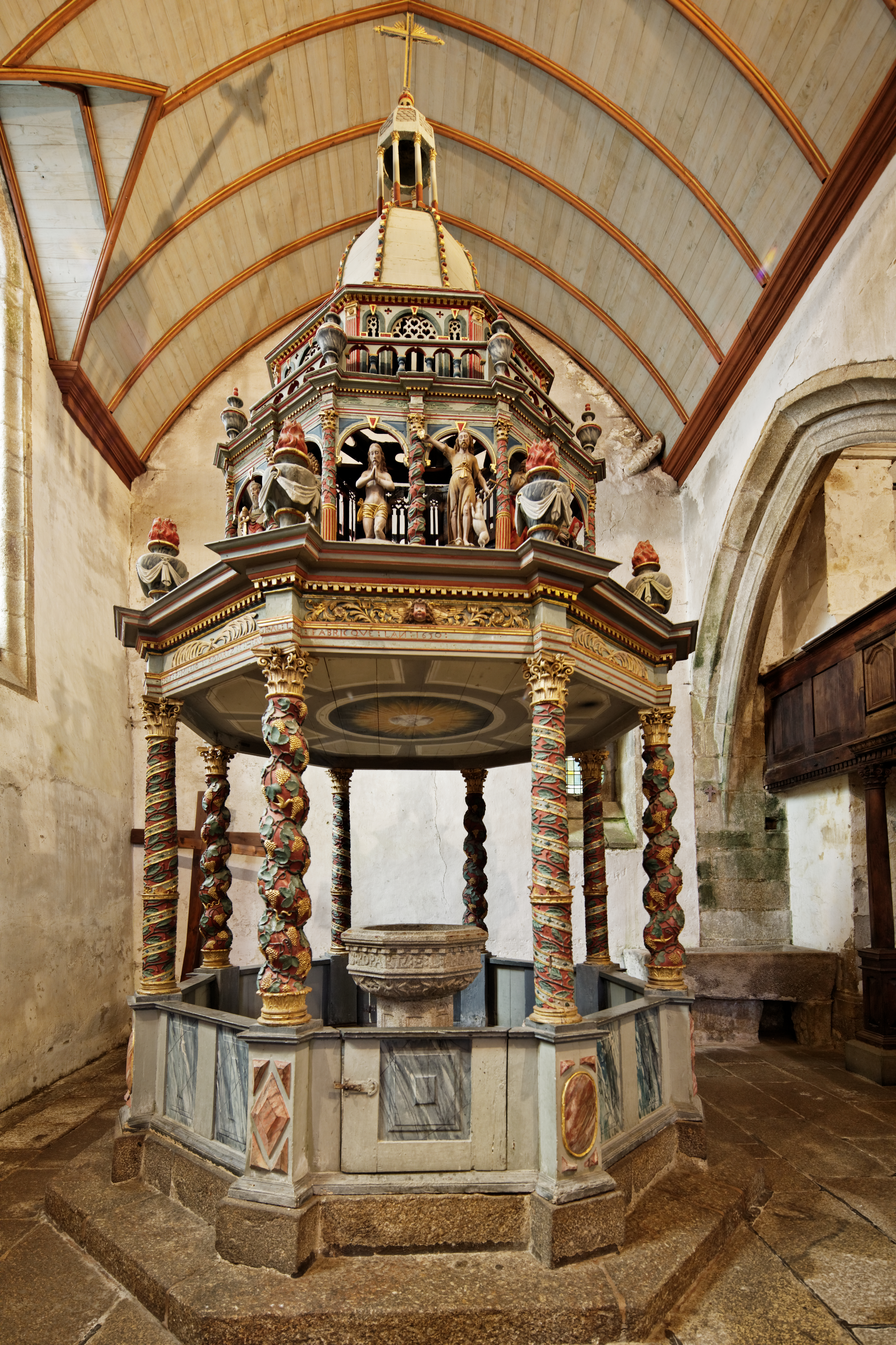 L'église Notre-Dame de l'enclos paroissial de Lampaul-Guimiliau dans le Finistère..